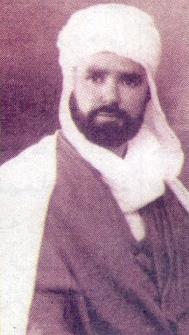 Mbarek El Mili à sont retour de Tunisie